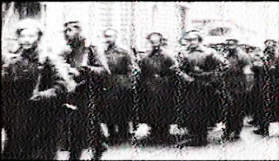 Беларуская (тарашкевіца): Чырвоная Армія ў Менску. 10 сьнежня 1918